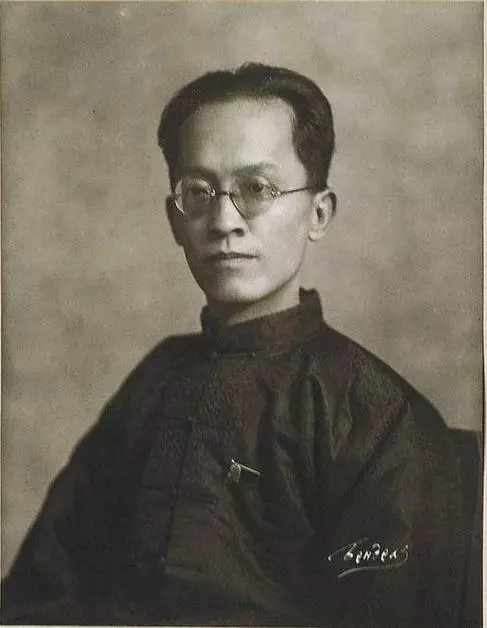 胡漢民 (1880 - 1936)